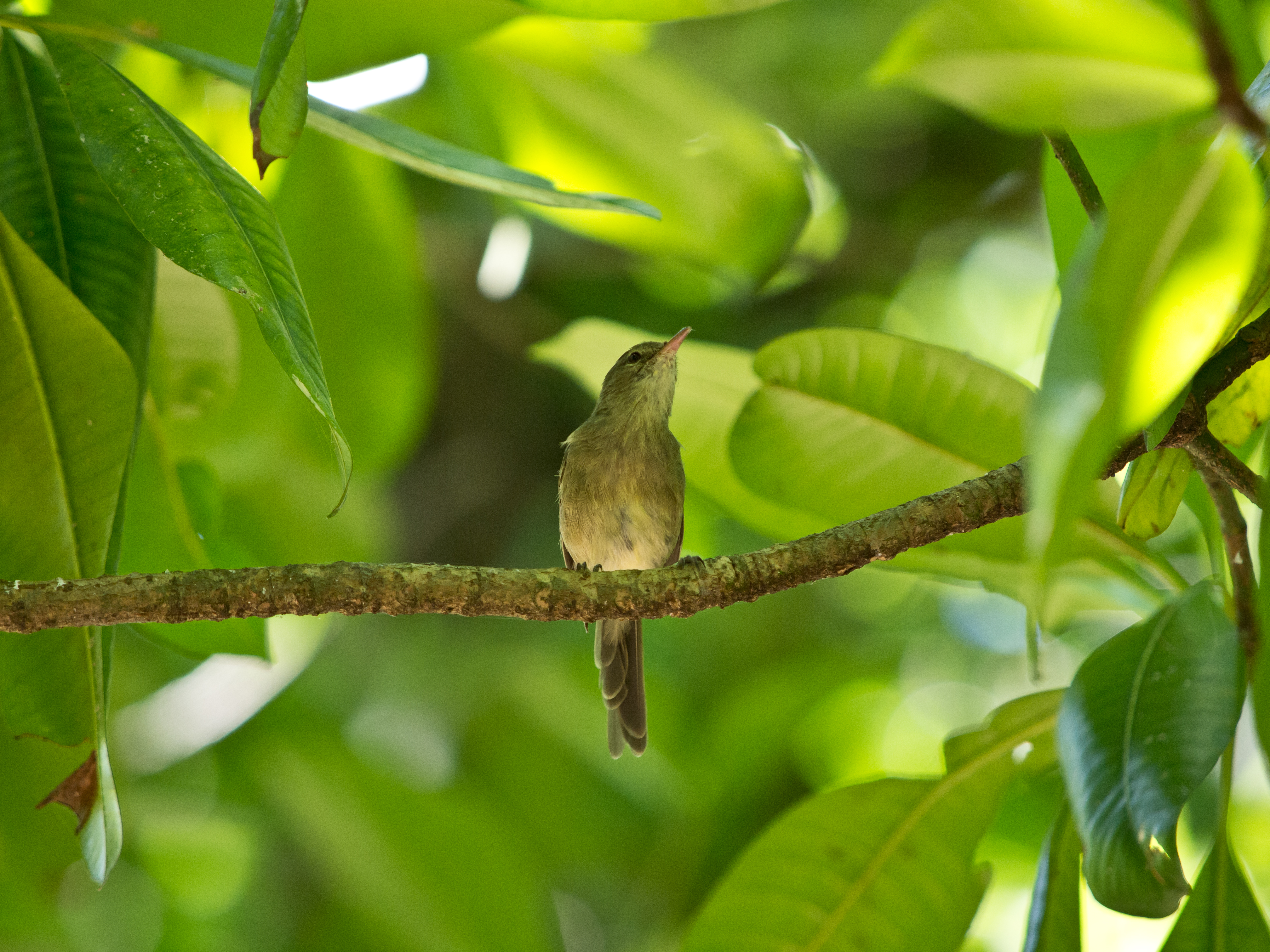 Seychellen-Rohrsaenger - Acrocephalus sechellensis auf Cousin, Seychellen